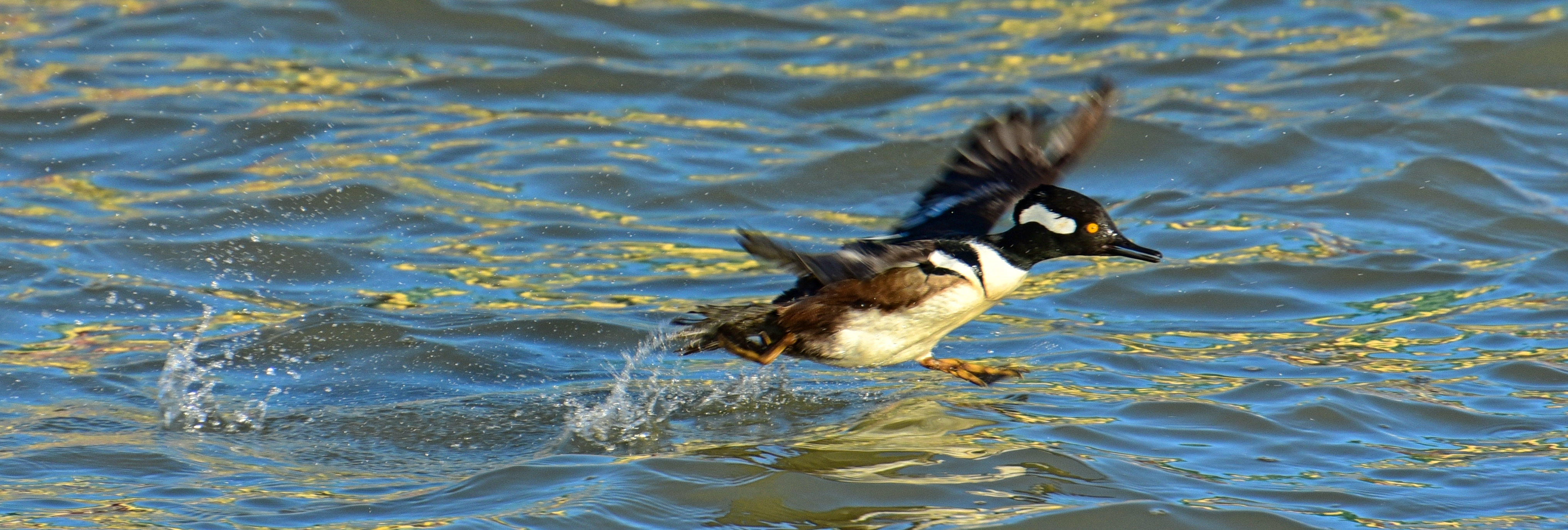 Самець креха жовтоокого біжить по поверхні води, перш ніж злетіти у гавані м. Кінкарден на озері Гурон, Онтаріо, Канада